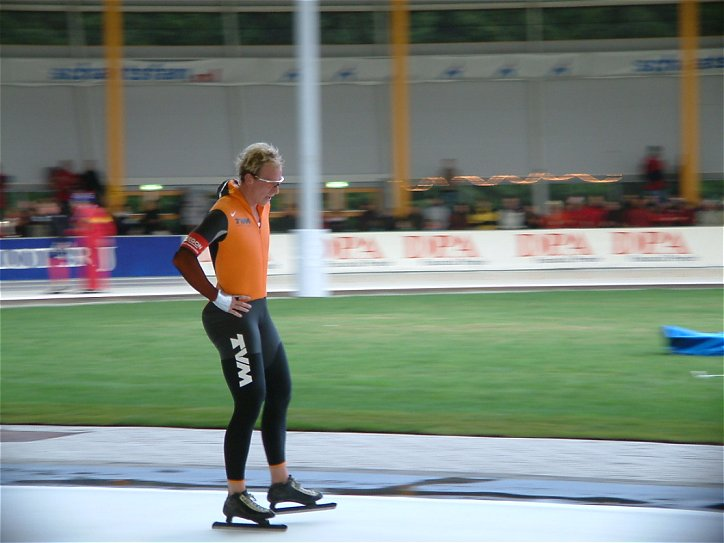 Rintje Ritsma tijdens het NK Allround in het Ijssportcentrum in Eindhoven